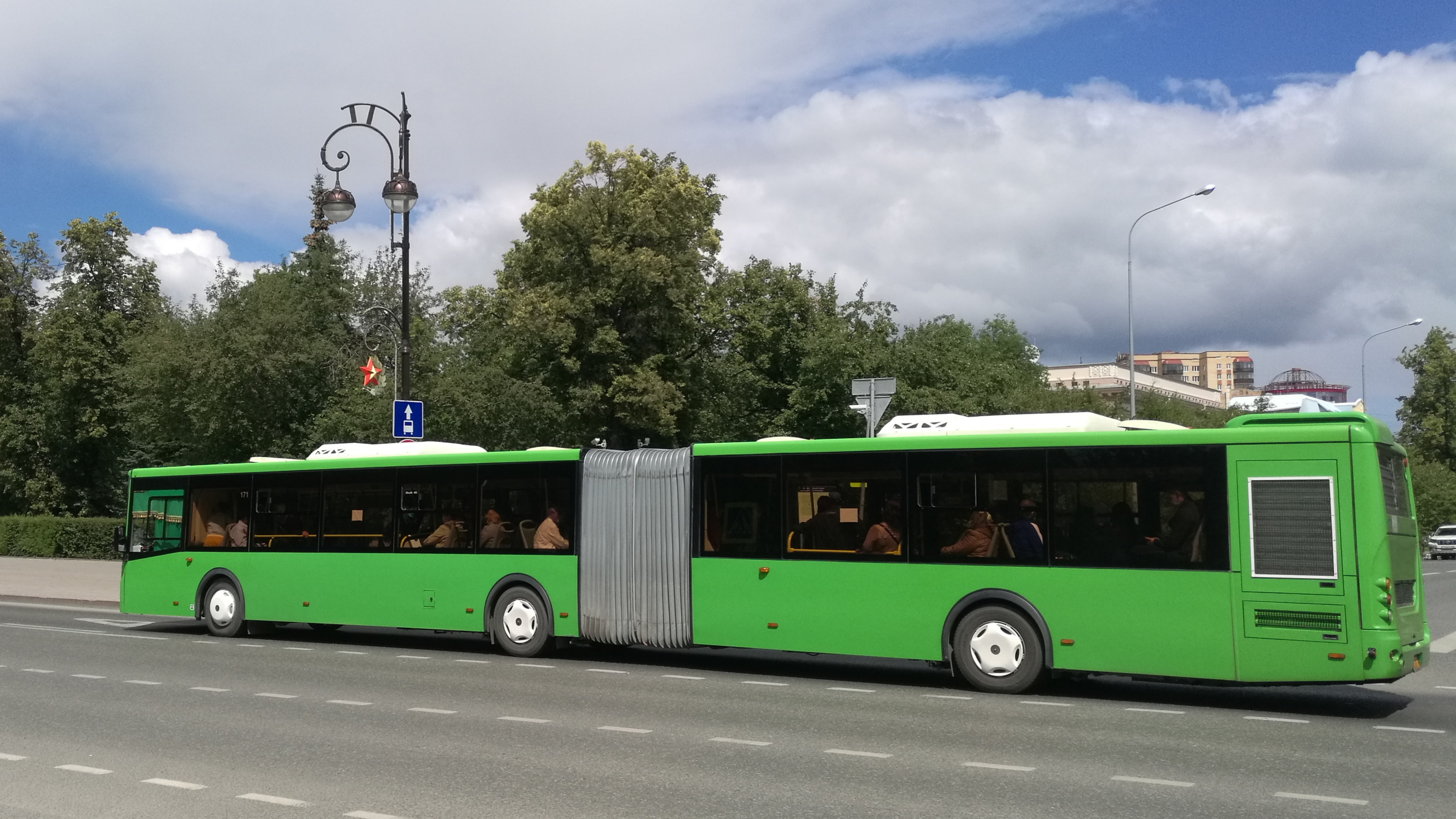 Buso LIAZ 6213 en strato Respubliko. Tjumeno, Rusio.